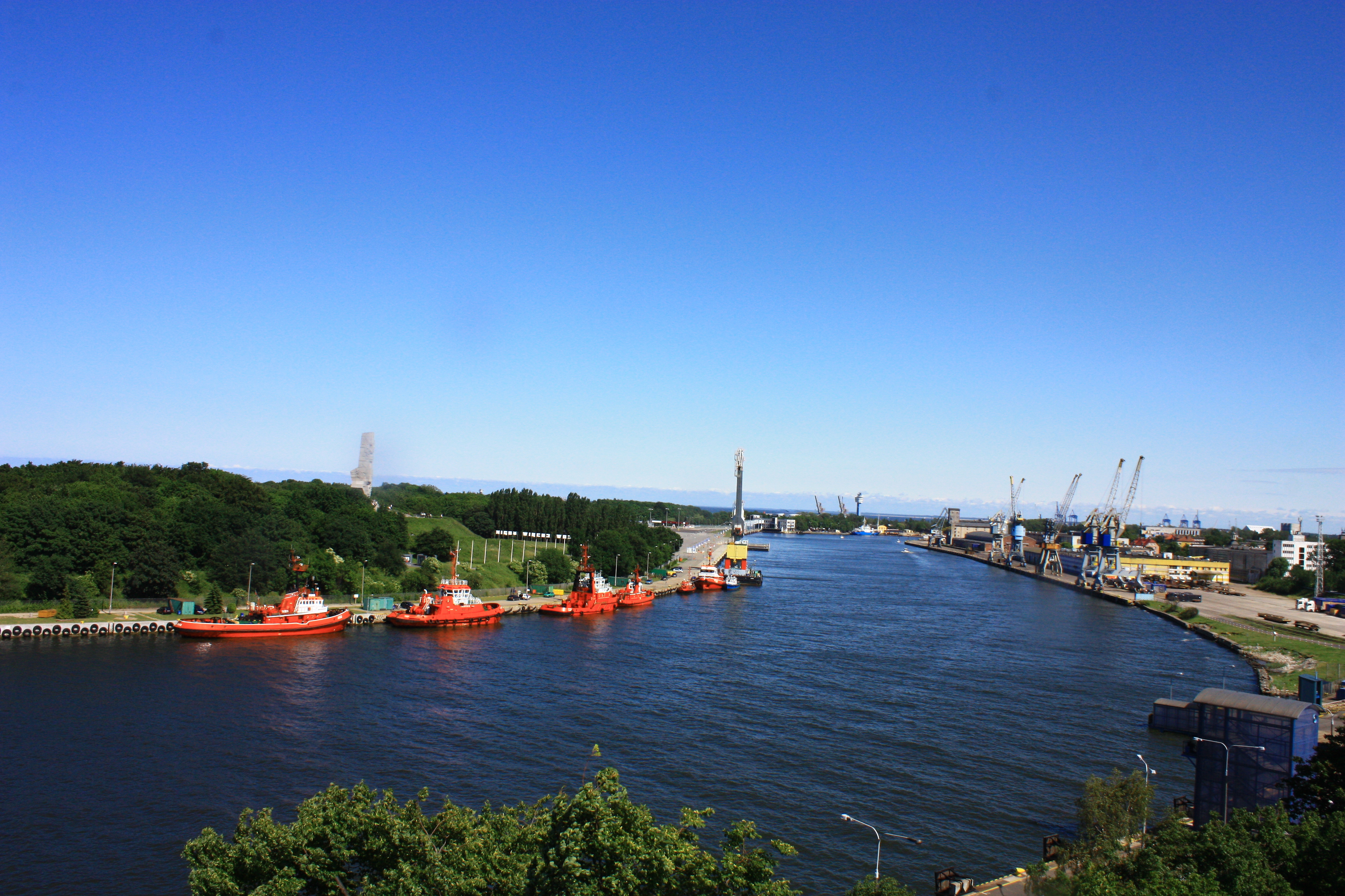 Gdańsk, latarnia morska, 1482, 1577, 1720